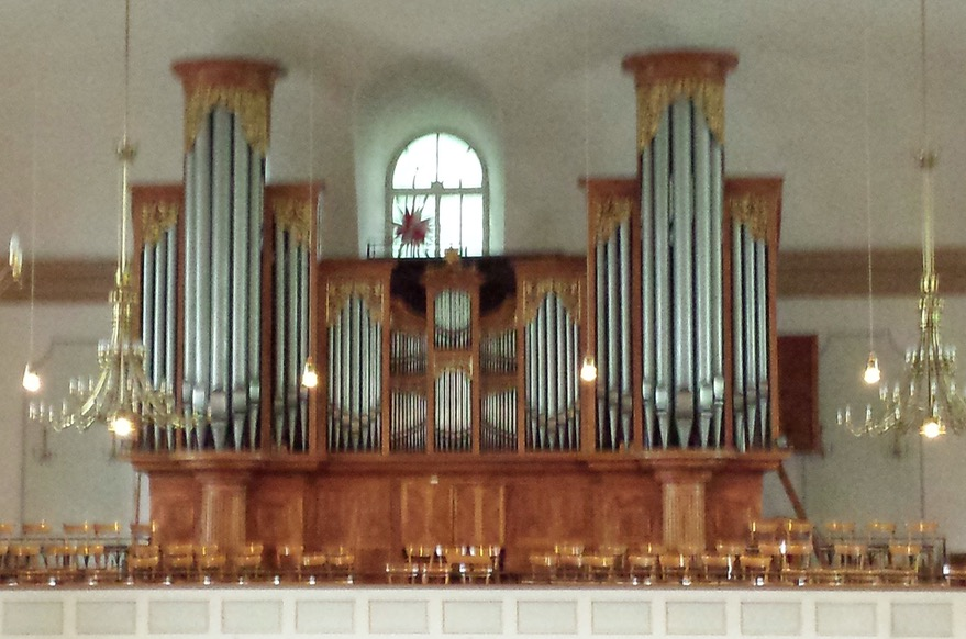 Alte Oberlingerorgel Pauluskirche Bad Kreuznach